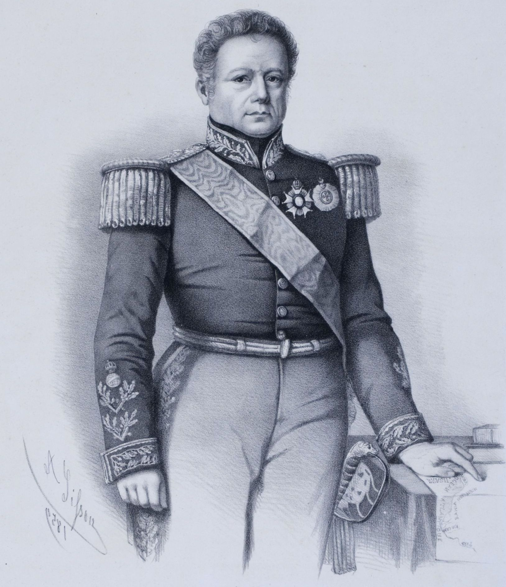 Litografia em preto e branco